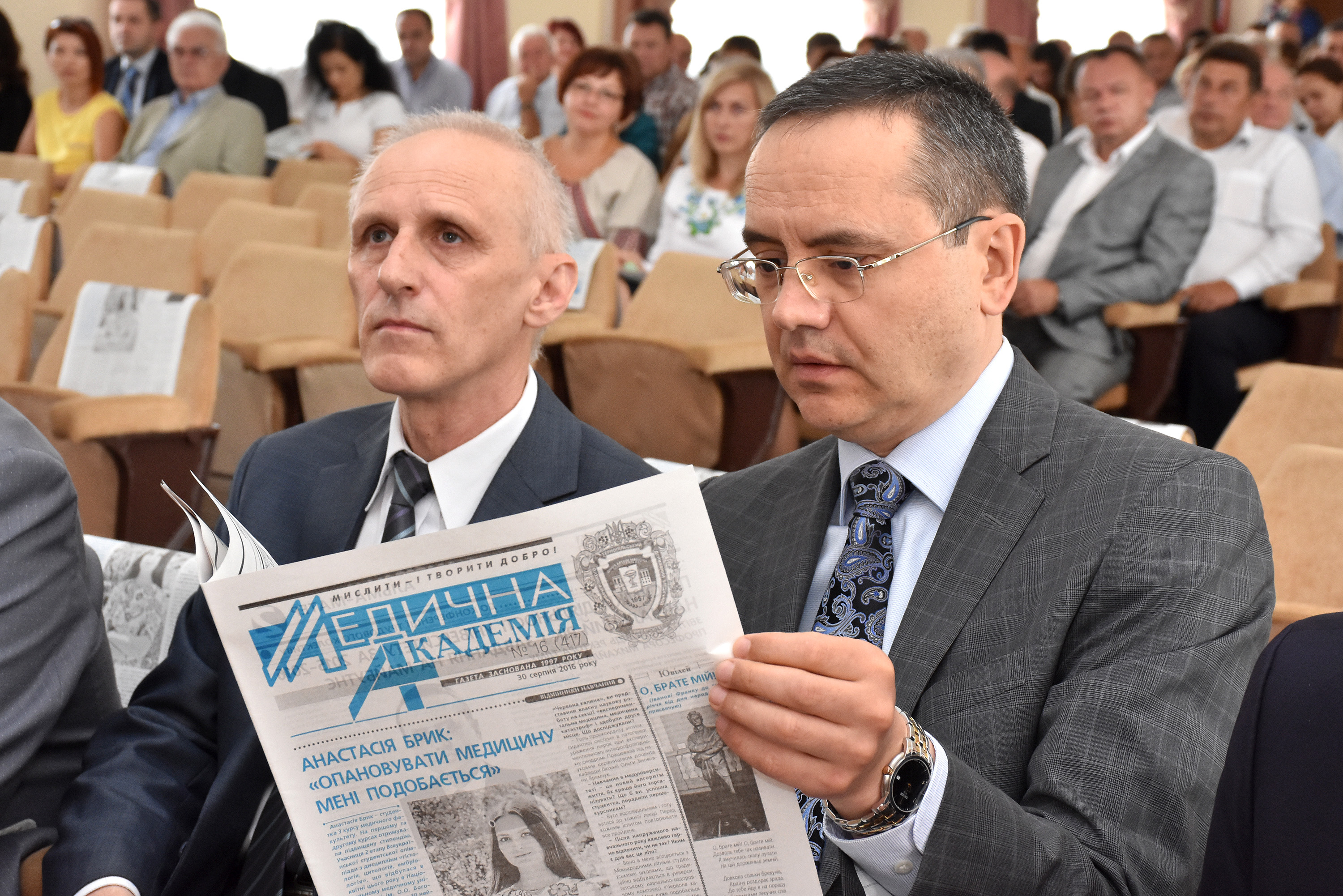 Проректор з наукової роботи ТДМУ, професор Іван Кліщ та ректор вишу, професор Михайло Корда читають газету «Медична академія».